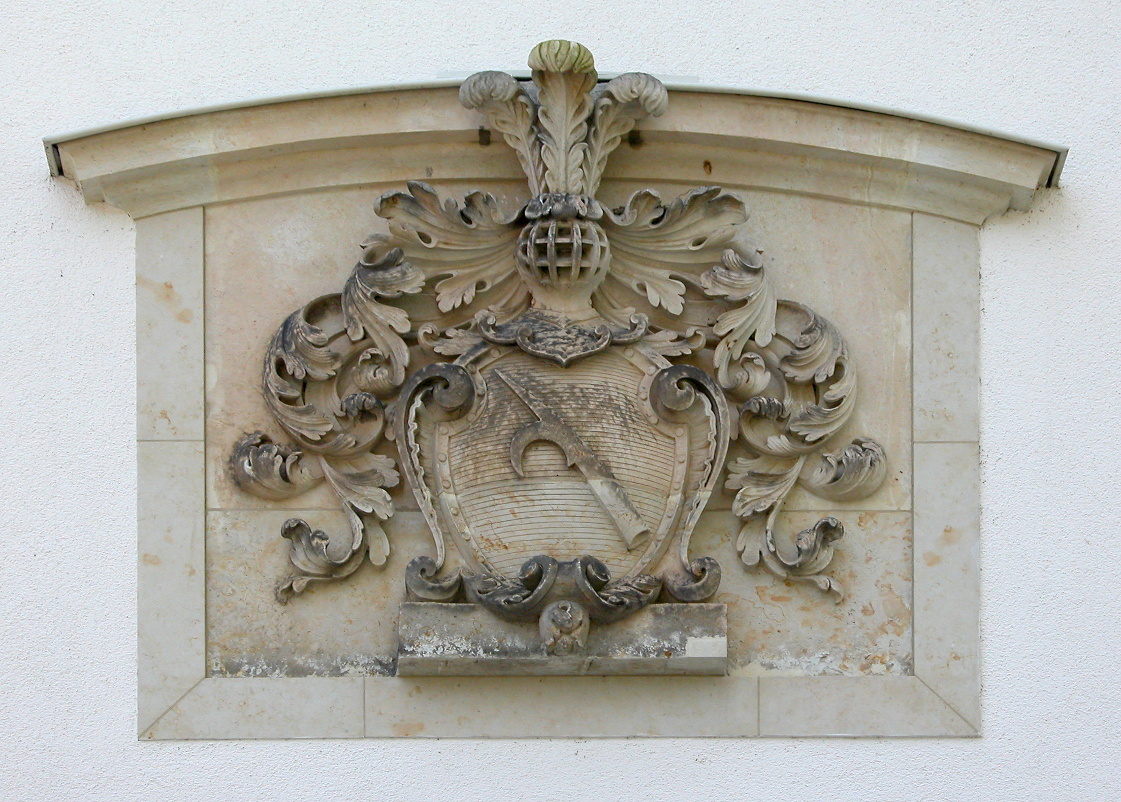 28.04.2008 02742 Friedersdorf (Neusalza-Spremberg) Am Pflegeheim 4: Schloß Friedersdorf, heute Seniorenheim ASB-Pflegeheim. Auf dem Niederfriedersdorfer Gut von 1887-89 unter Hans Leo von Oppell nach Plänen des Architekt Heinrich Schubert erbaut. In der DDR war es bis 1957 Schulungsheim der CDU und seit 1961 Altersheim. Seit der Wende führt der Arbeiter-Samariter-Bund Löbau das Seniorenheim. Wappen Hans Leo von Oppell an der Nordwand. [DSCN32498.TIF]20080428330DR.JPG(c)Blobelt